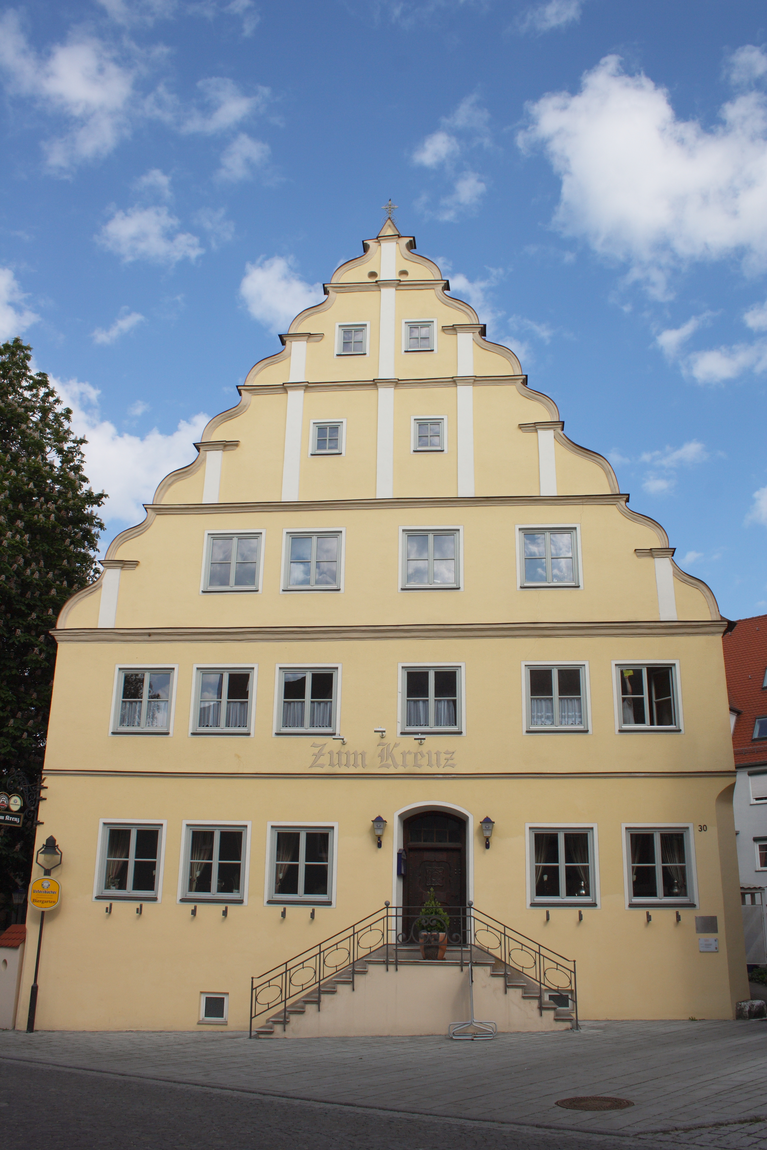 Haus Hauptstraße 30 in Gundelfingen an der Donau, Gasthaus zum Kreuz